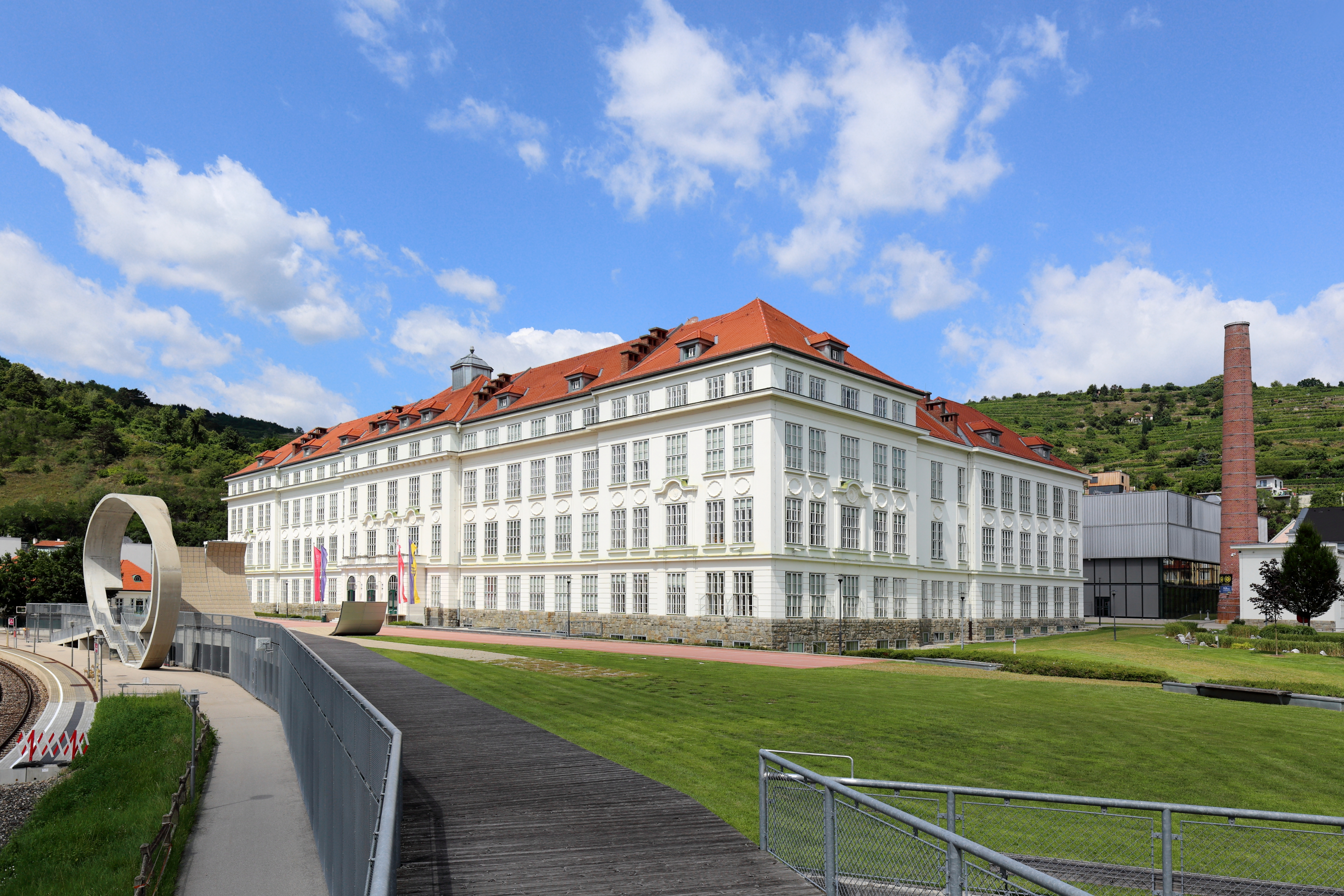 Hauptgebäude der Donau-Universität Krems in Stein an der Donau, ein Ortsteil der niederösterreichischen Stadt Krems. Rechts im Hintergrund der Schlot des Heizhauses der ehemaligen Fabrik und der Campus, der nach Plänen des Architekten Dietmar Feichtinger errichtet und am 7. Oktober 2005 eröffnet wurde.Das Fabriksgebäude, ein dreistöckiger Stahlbetonskelettbau in der Formensprache eines „dritten Barock“, wurde von 1919 bis 1922 nach Plänen des Architekten Paul Hoppe als Tabakfabrik für die Österreichische Tabakregie errichtet. Die Eröffnung der neuen Fabrik nahm am 16. Juni 1922 der damalige Generaldirektor der Tabakwerke, Dr. Karl Dorrek, vor und in den Jahr 1987/91 wurde die Produktionsstätte geschlossen. Leerstehende Räumlichkeiten mit einer Nutzfläche von rd. 1500 m² wurden bereits ab Oktober 1988 von der Wissenschaftlichen Landesakademie für Niederösterreich genutzt. Im Anschluss adaptierte Architekt Manfred Wehdorn das historische Gebäude, so dass rd. 12.000 bis 15.000 m² Nutzfläche mit der Eröffnung der Donau-Universität Krems am 13. September 1995 zur Verfügung standen.